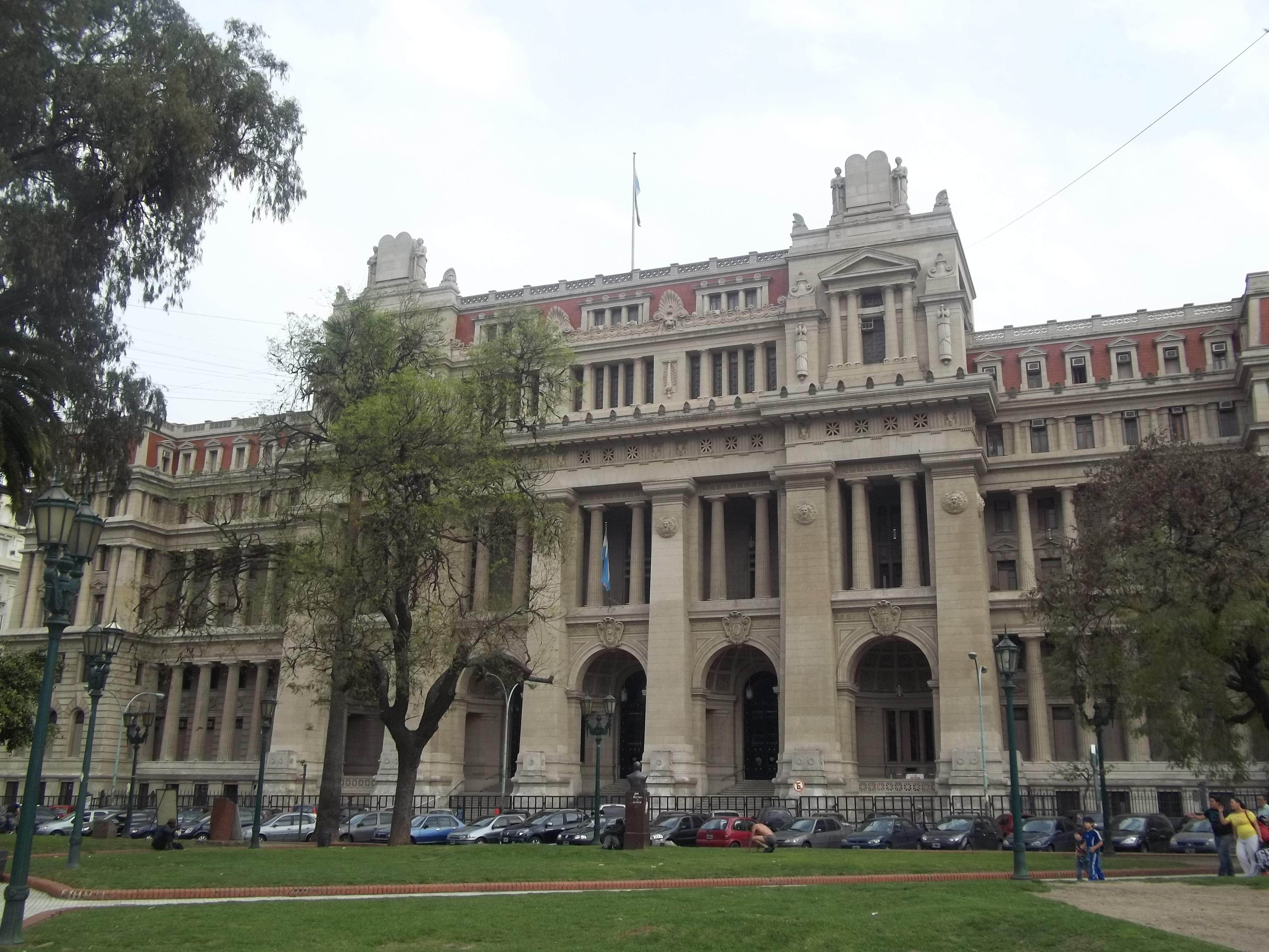 Palacio de Justicia de la Nación